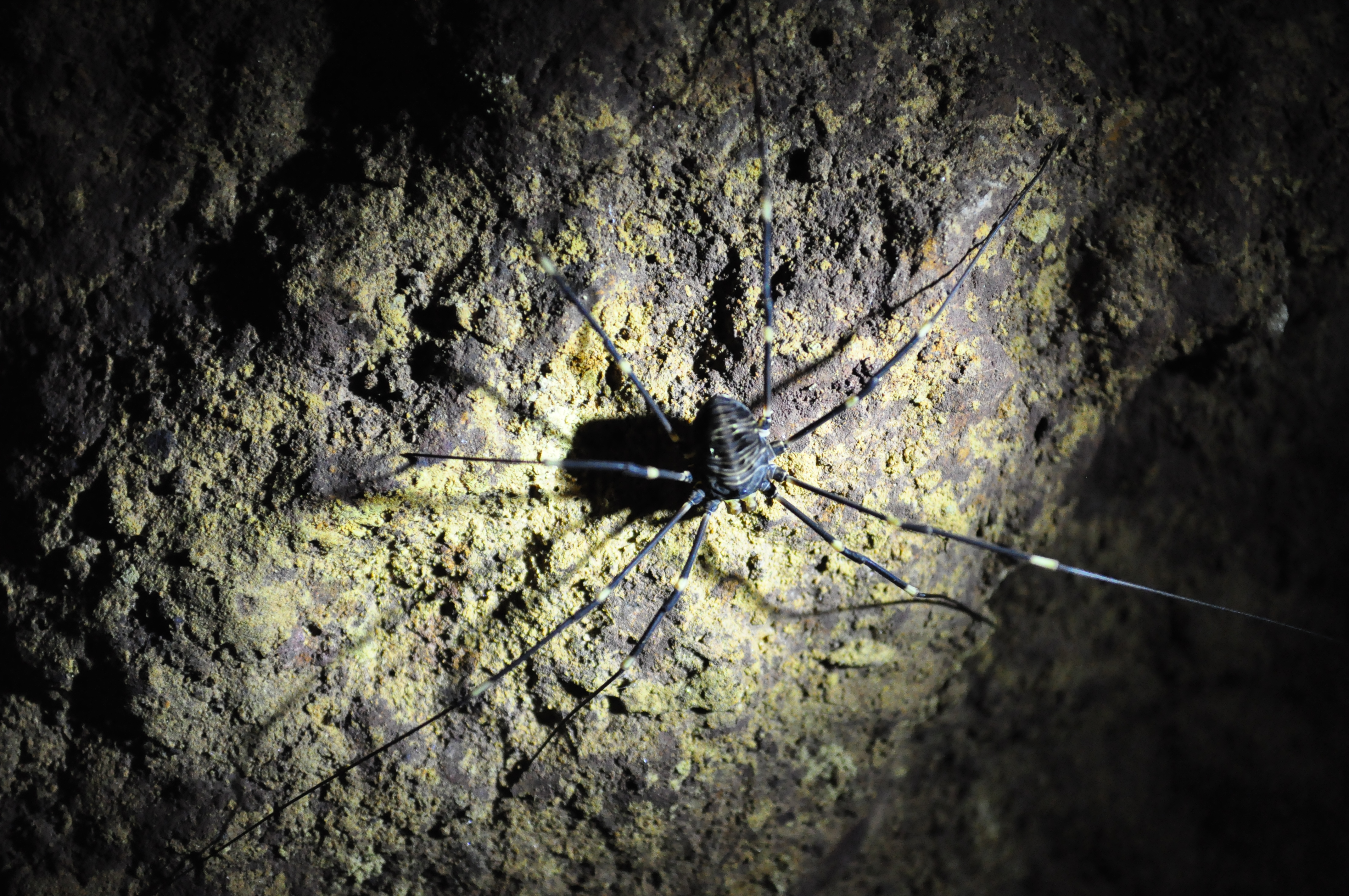 Gyas titanus opilioia Urallaga Sistemako kobazulo batean (Trianoko mendiak, Galdames).